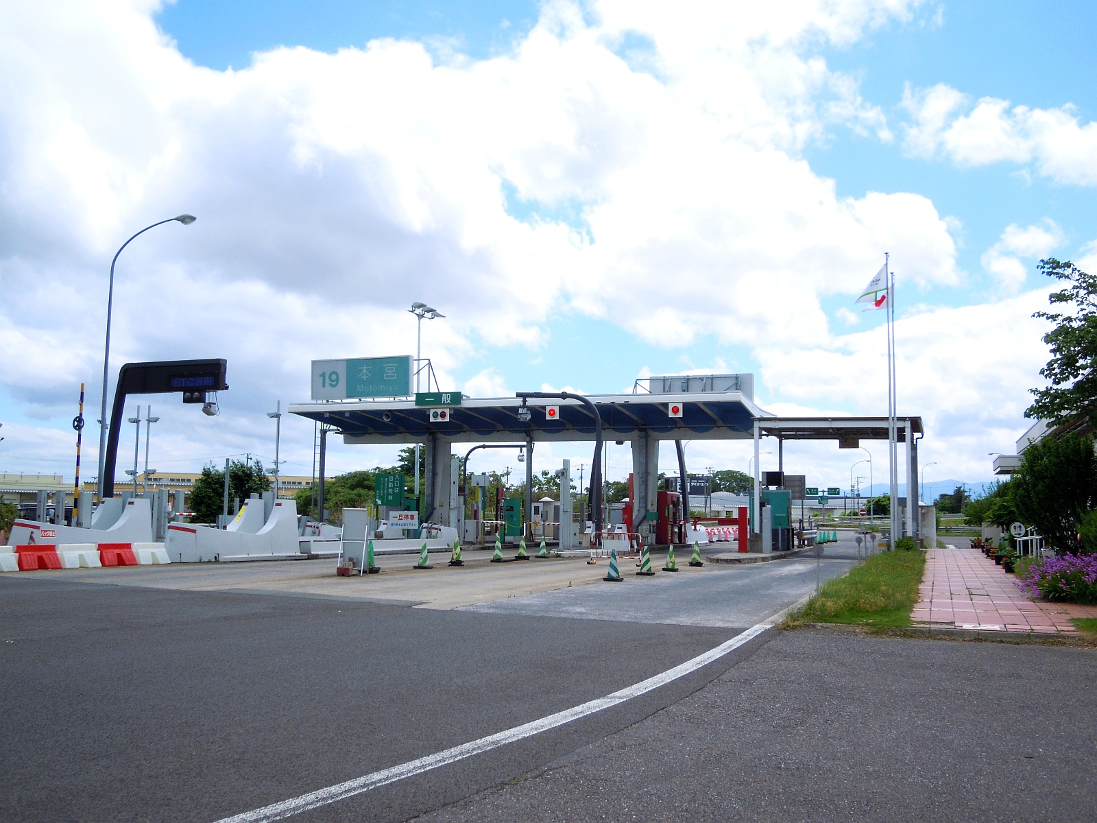 福島県本宮市にある東北自動車道本宮インターチェンジ料金所を一般道側から。